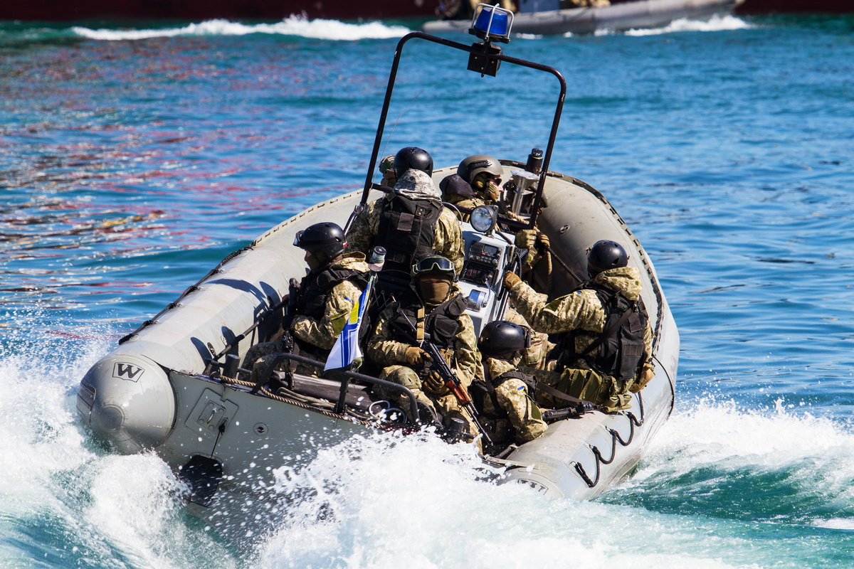 В Одесі відзначили День Флоту України Фото Олександр Шепелєв